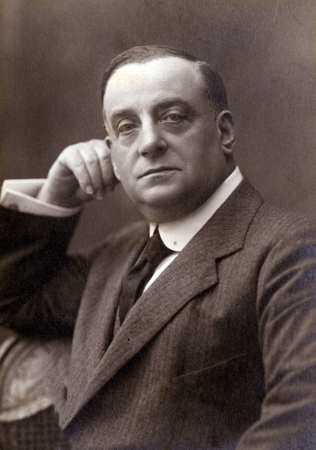 Virgilio Talli attore